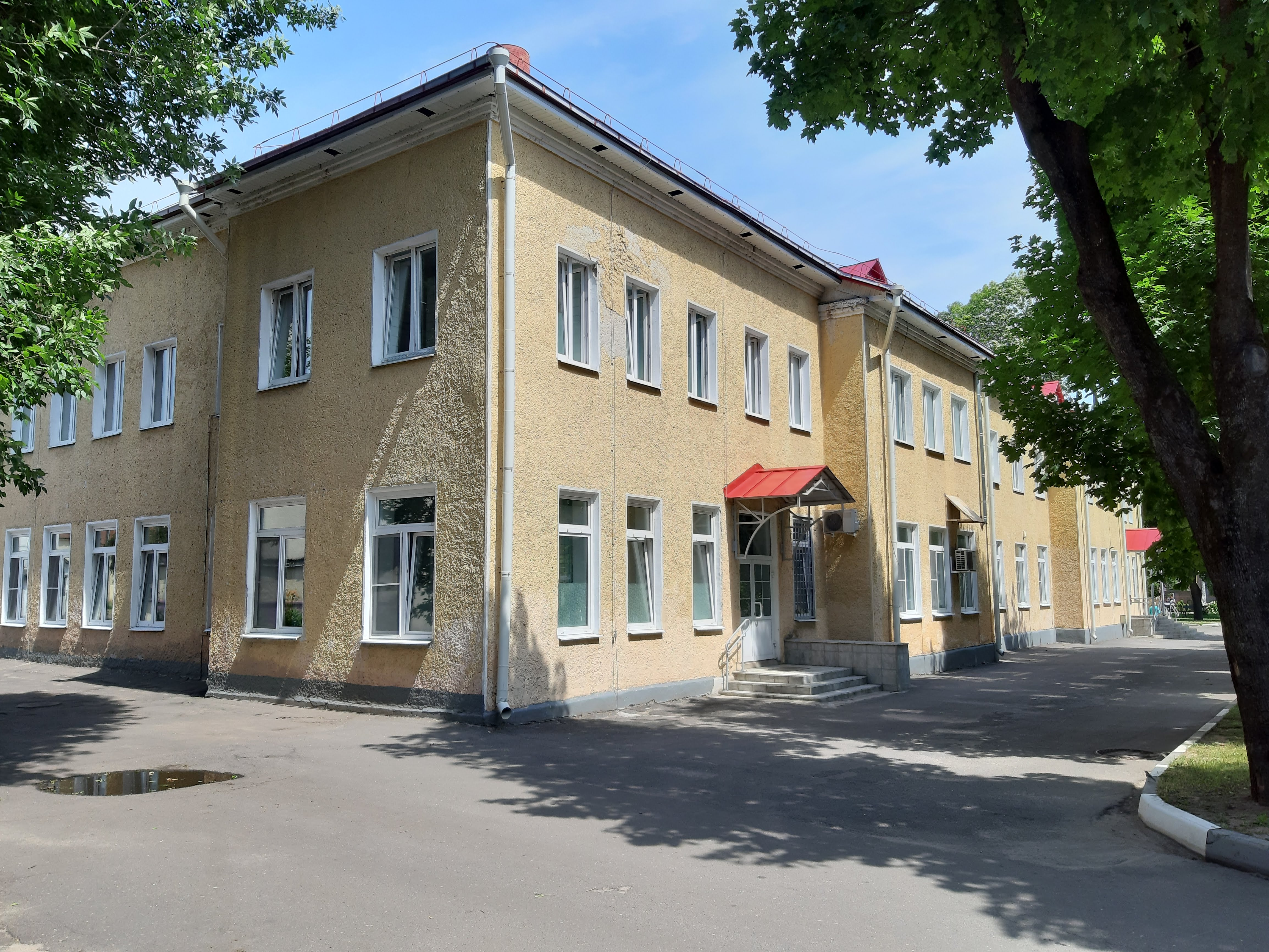 Магілёў. На тэрыторыі бальніцы